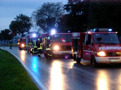 Blaue Rundumkennleuchten: Feuerwehr im Einsatz